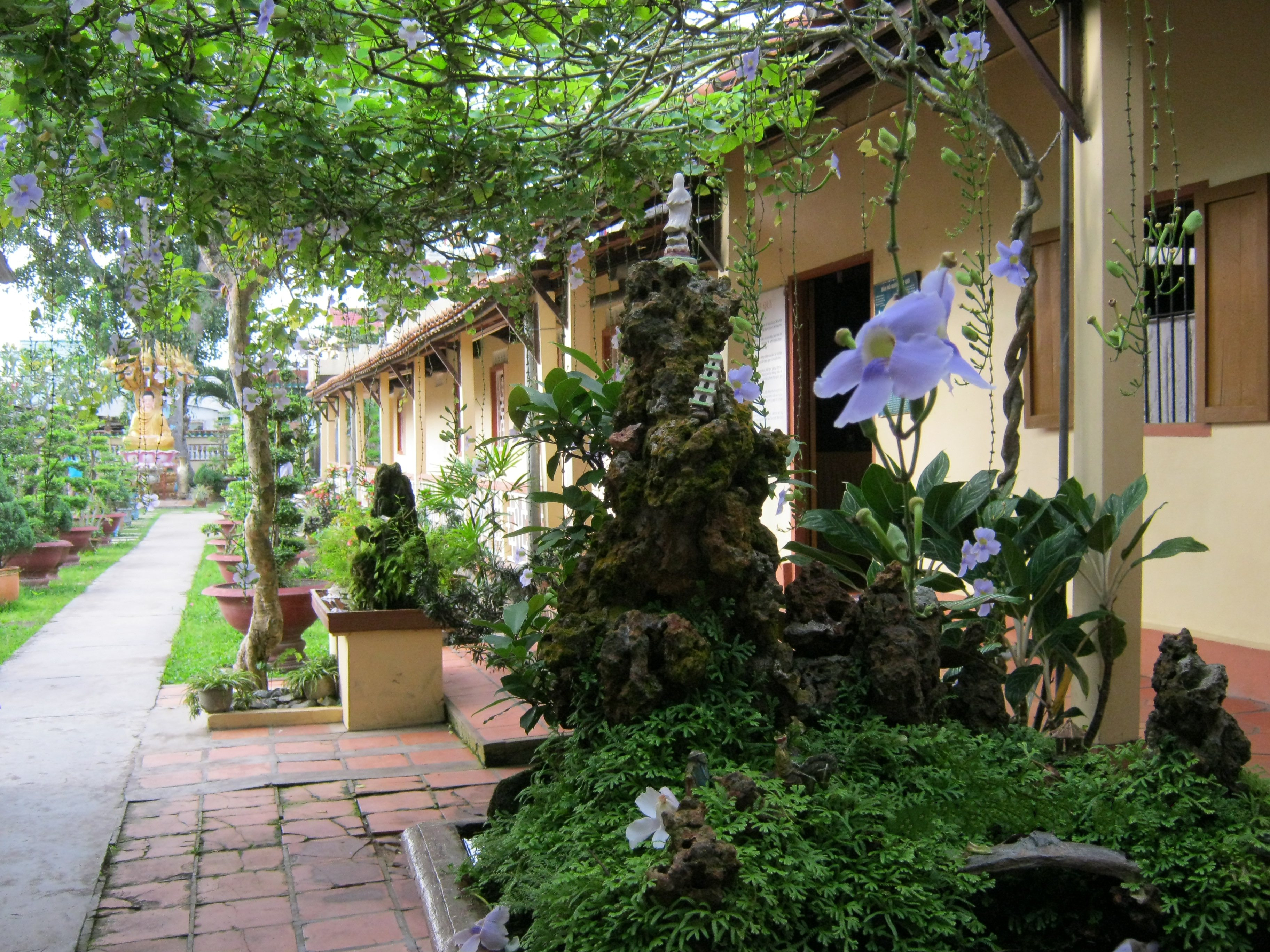 Bên hông chùa Tiên Châu, hiện tọa lạc trên cù lao An Bình, thuộc huyện Long Hồ, tỉnh Vĩnh Long (Việt Nam).